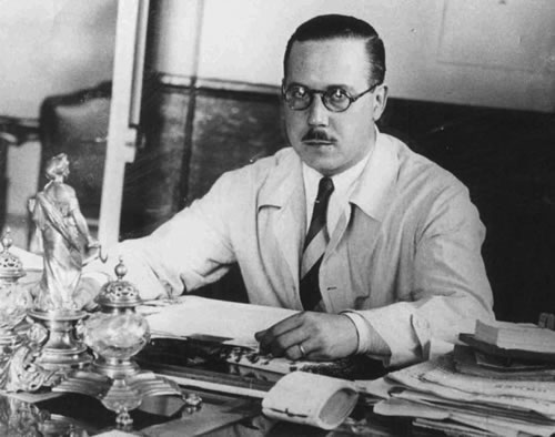 Fotografía del Rector de la Universidad Nacional de Tucumán, Horacio Descole. Año 1947.